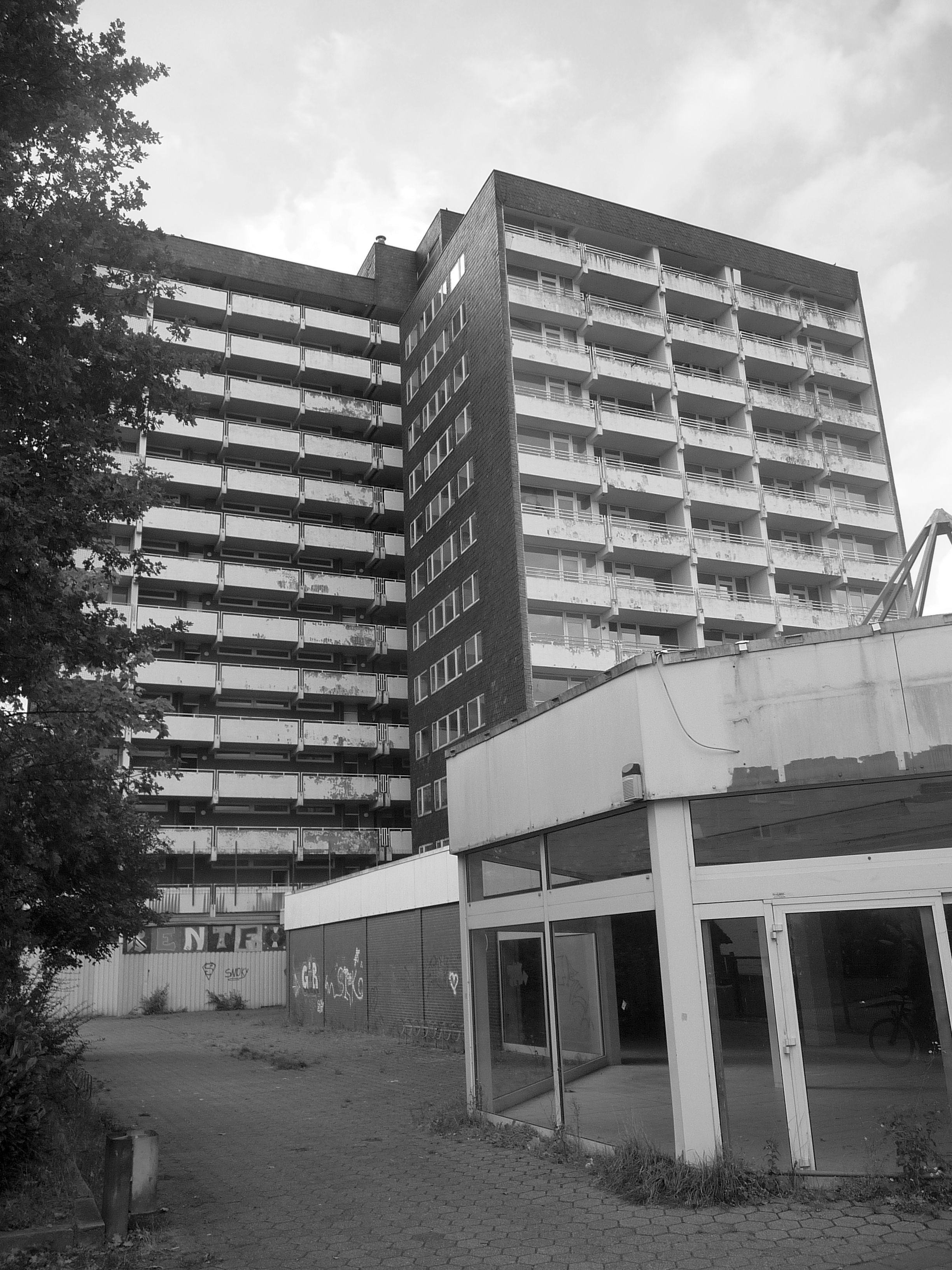 Wohnblock Gladbeck in schwarz-weiß